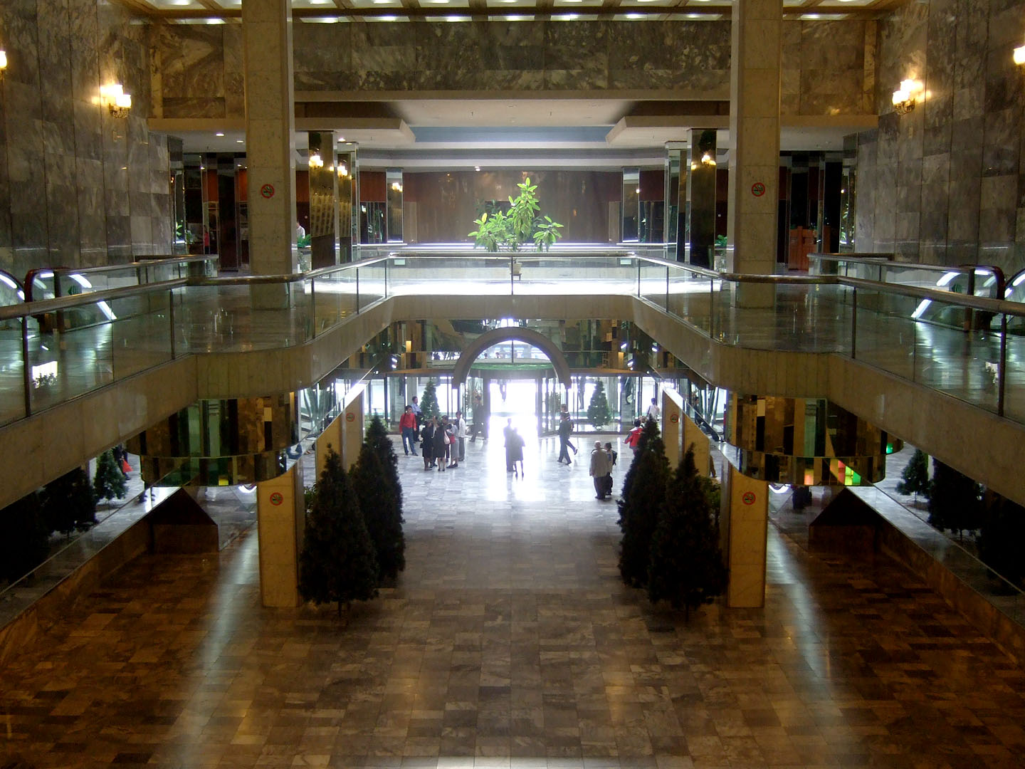 Koryo Hotel in Pyongyang, DPRK